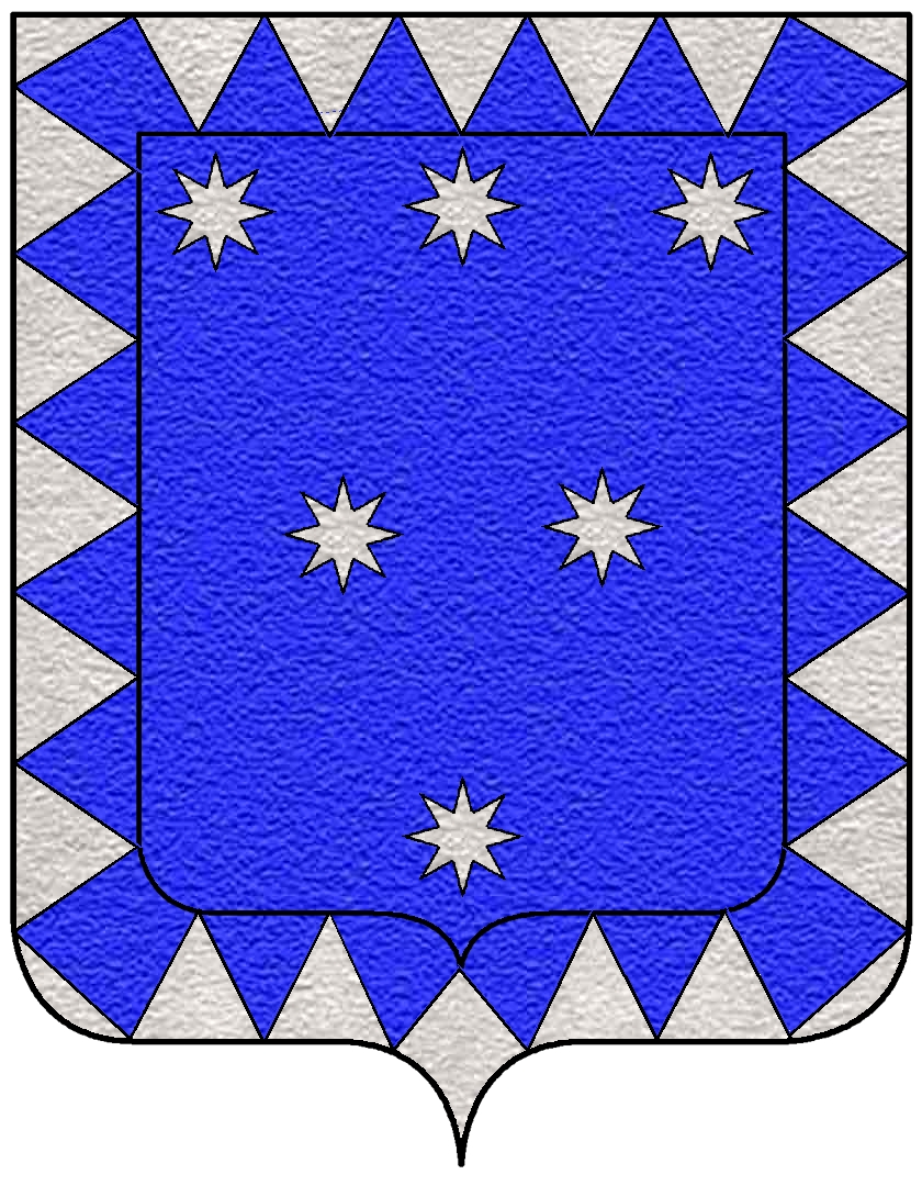 Stemma della famiglia Altieri